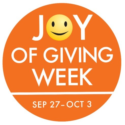 JoyOfGivingWeek